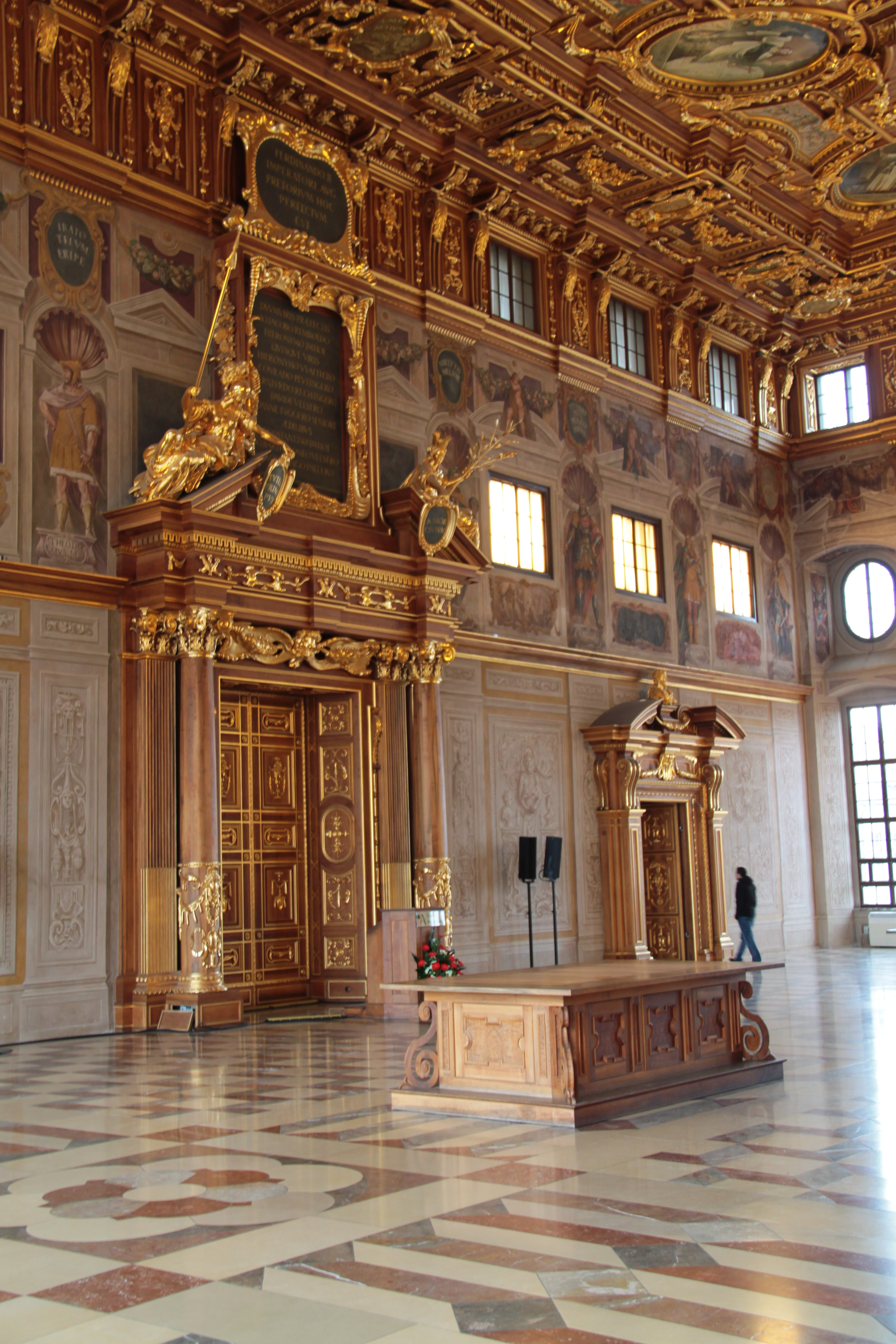 Impressionen Augsburg